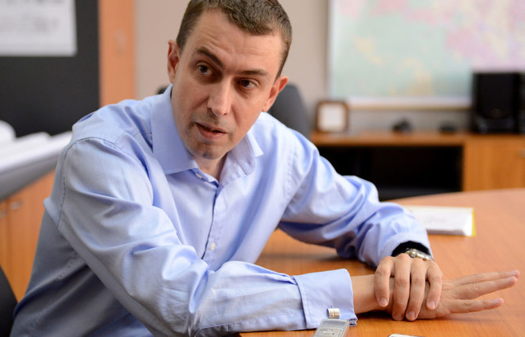 Арх. Здравков